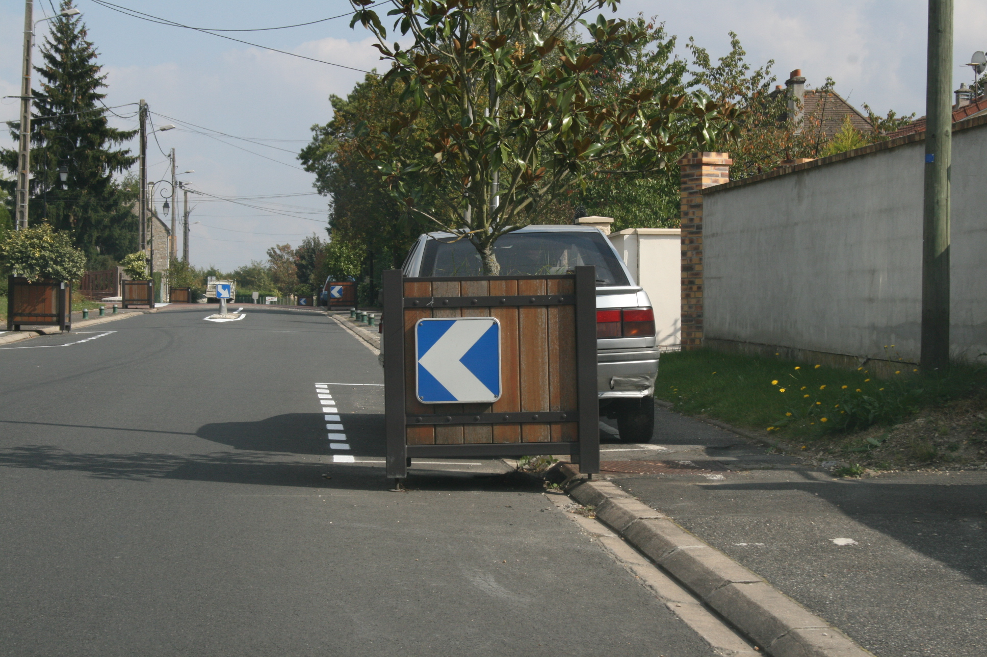 Balise de virage J4 monochevron mal utilisée (France)